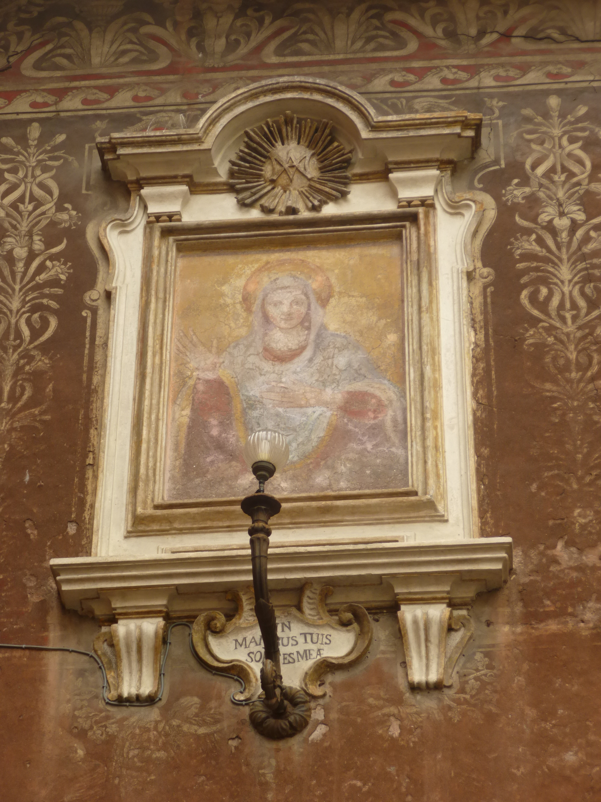 Roma, piazza del Biscione, madonna sulla facciata delle c.d. "Stalle degli Orsini" (palazzetto già Orsini, passato nel XVII sec. ai Pio di Savoia, e a metà del XIX al banchiere Righetti).